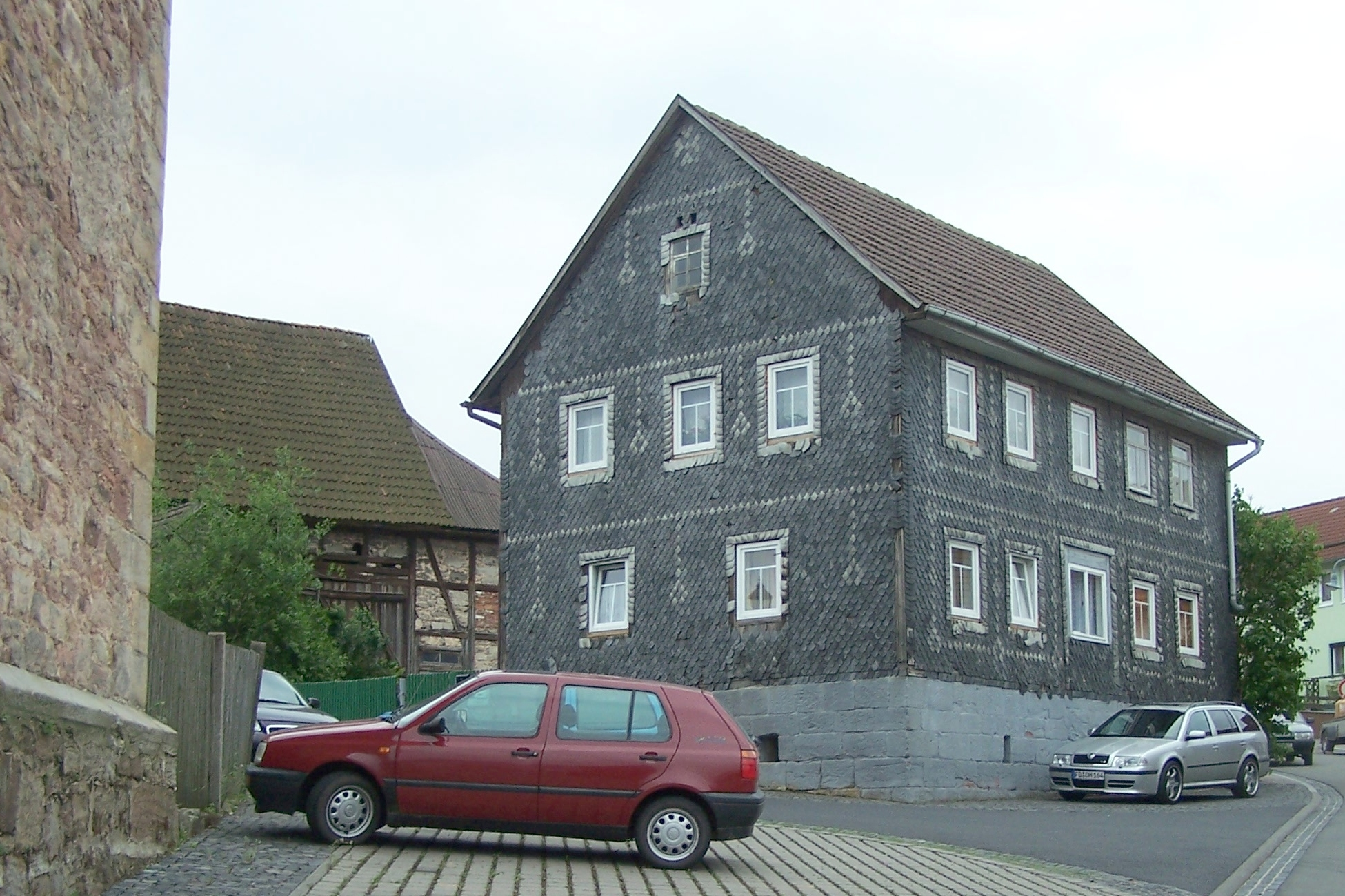 Mit traditionelem Schiefer verkleidetes Wohnhaus in der Ortslage Urnshausen.